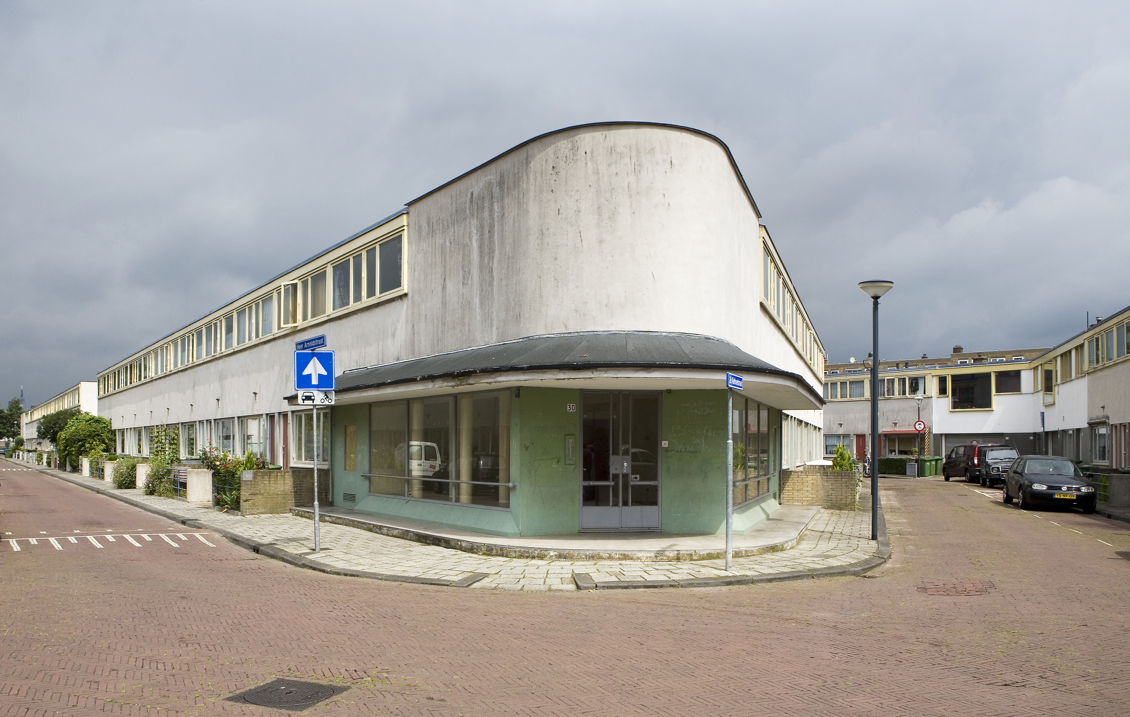 Kiefhoek: Overzicht uiteinde straat eindigend in winkel in de wijk Kiefhoek van J.J.P. Oud